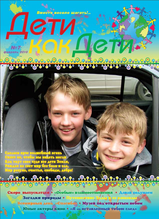 Лауреаты Всероссийского поэтического конкурса им. Николая Рубцова на обложке журнала «Дети как Дети» (№ 7, февраль 2010 г.)